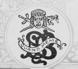 Fac-simile du sceau de Sarah Bernhardt